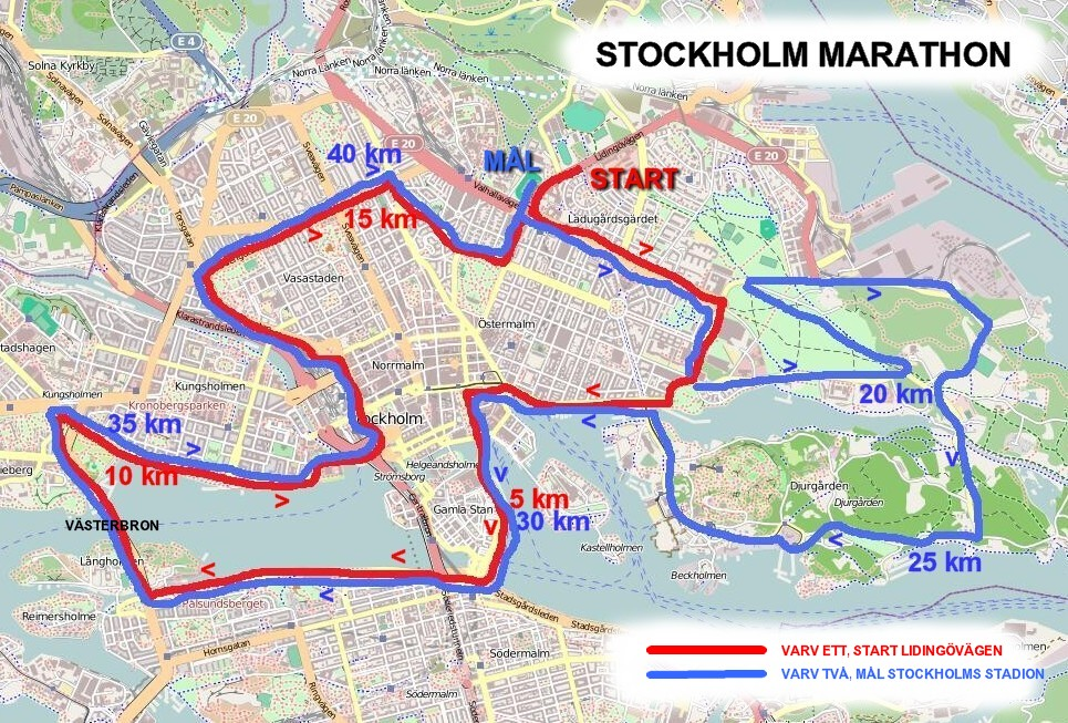 Stockholm Marathon, sträckningen